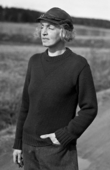 Den svenska författaren Sigge Stark (Signe Björnberg) 1945